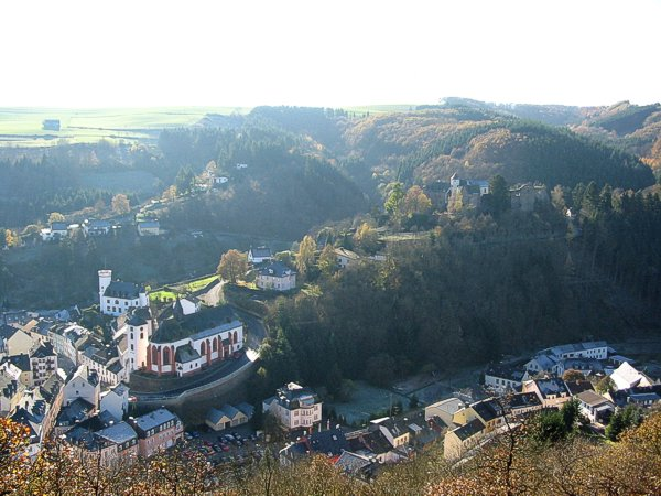 Burg Neuerburg von Osten, neben der eigentlichen Burg bestand noch ein zweiter Befestigungsring, der sich bis zum Glockenturm (Torturm) erstreckt hat.